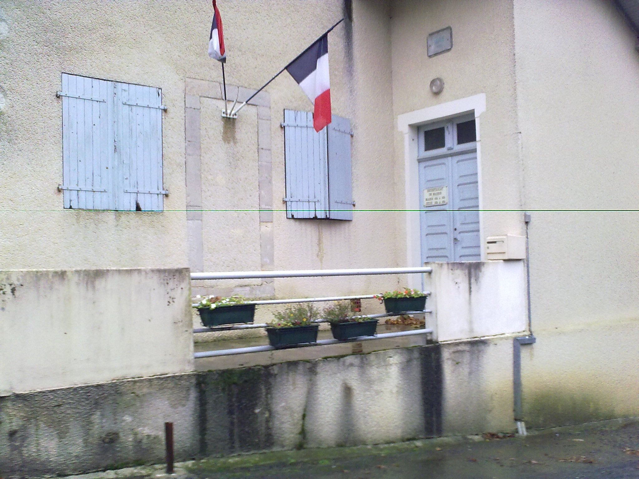 Coslédaà-Lube-Boast le 14 novembre 2010.